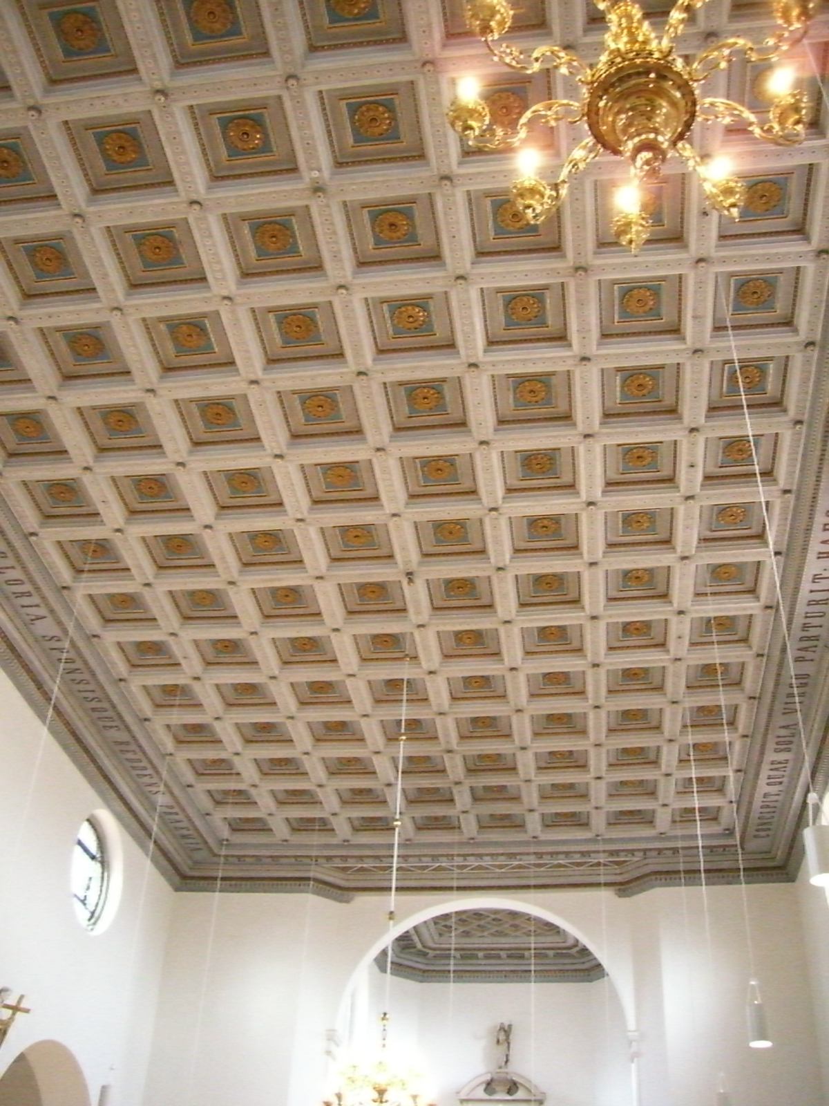 Kassettendecke der Pfarrkirche St. Regina (Drensteinfurt) / Coffer of the catholic church in Drensteinfurt